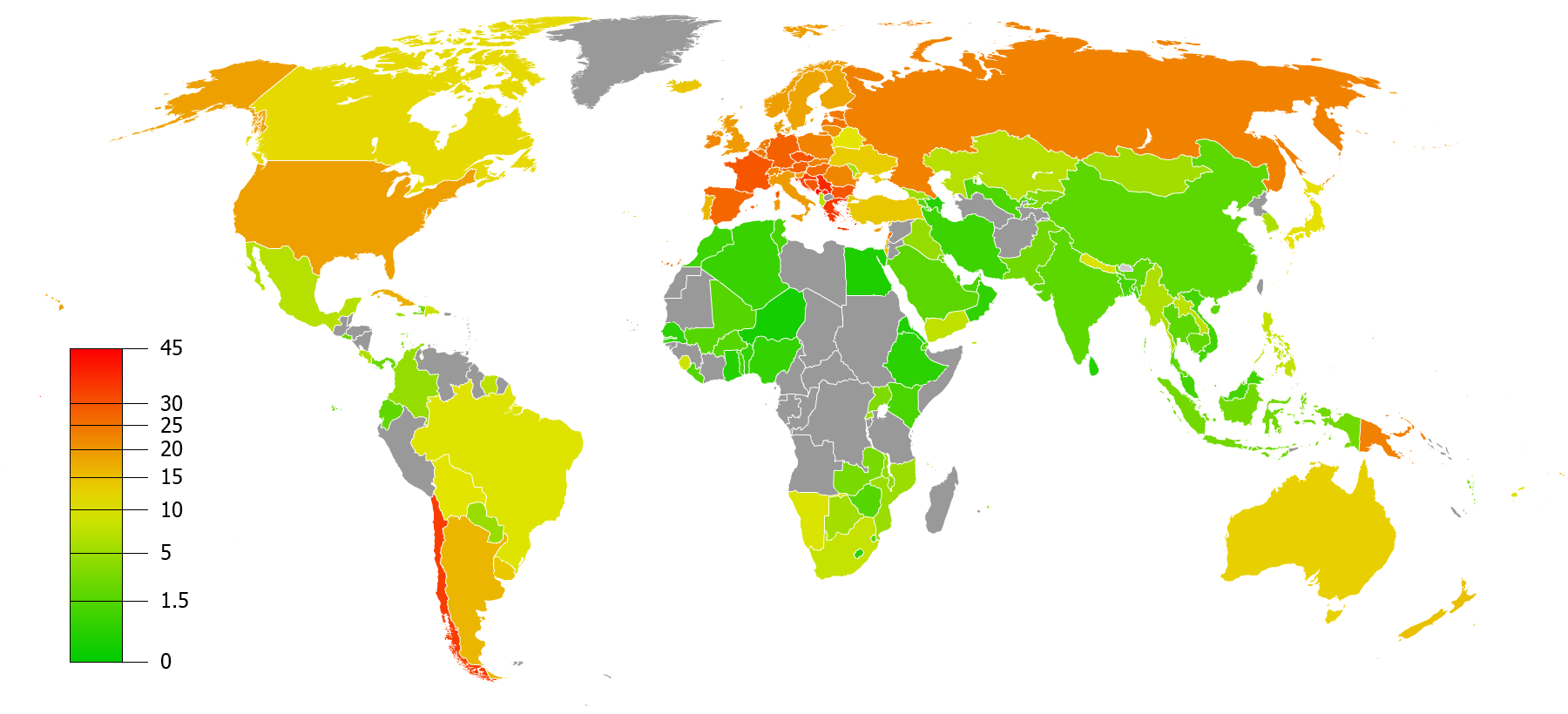 この 画像はGunnMapで作成されましたGunnMap は Arthur Gunn (User:Aaaarg) によって開発されたもので、無償で利用できます。 画像を利用の際は、出典として へのリンクを付記してください。